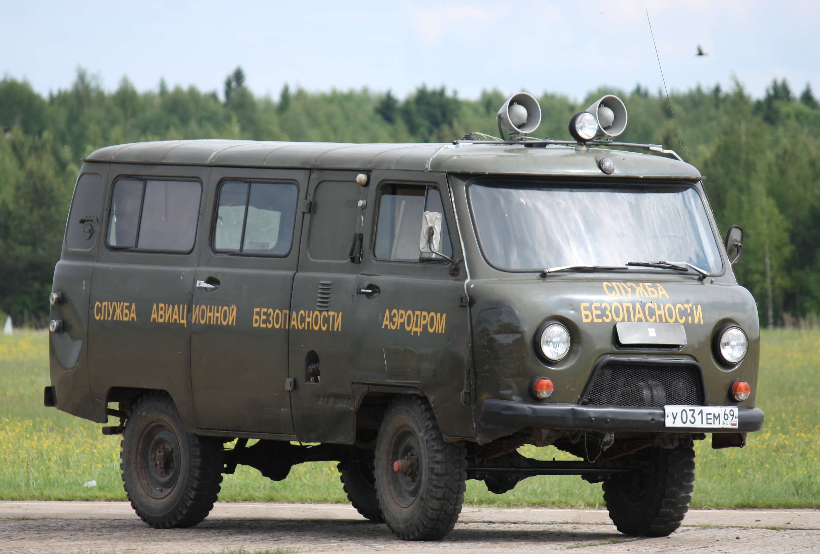 UAZ-452